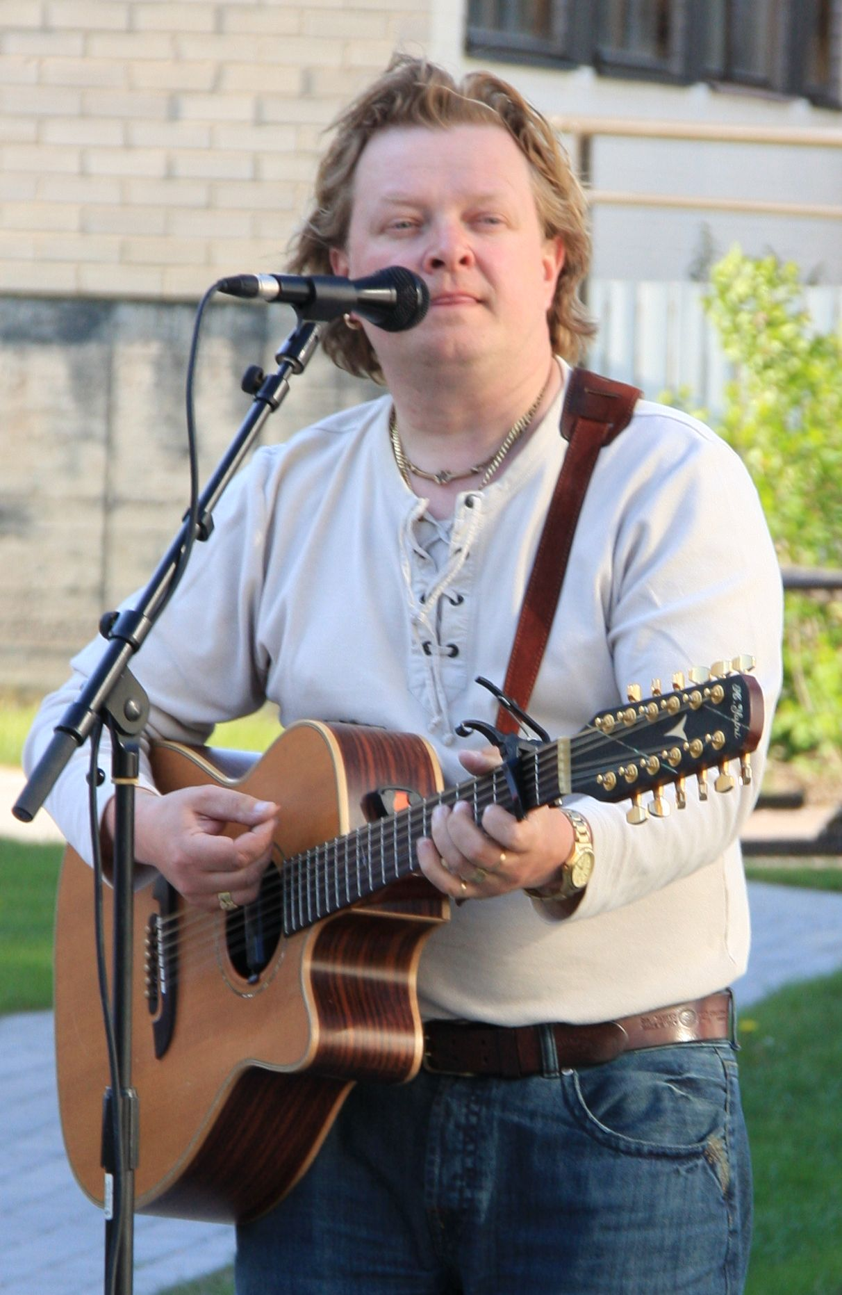 Rami Tapper suomalainen laulaja